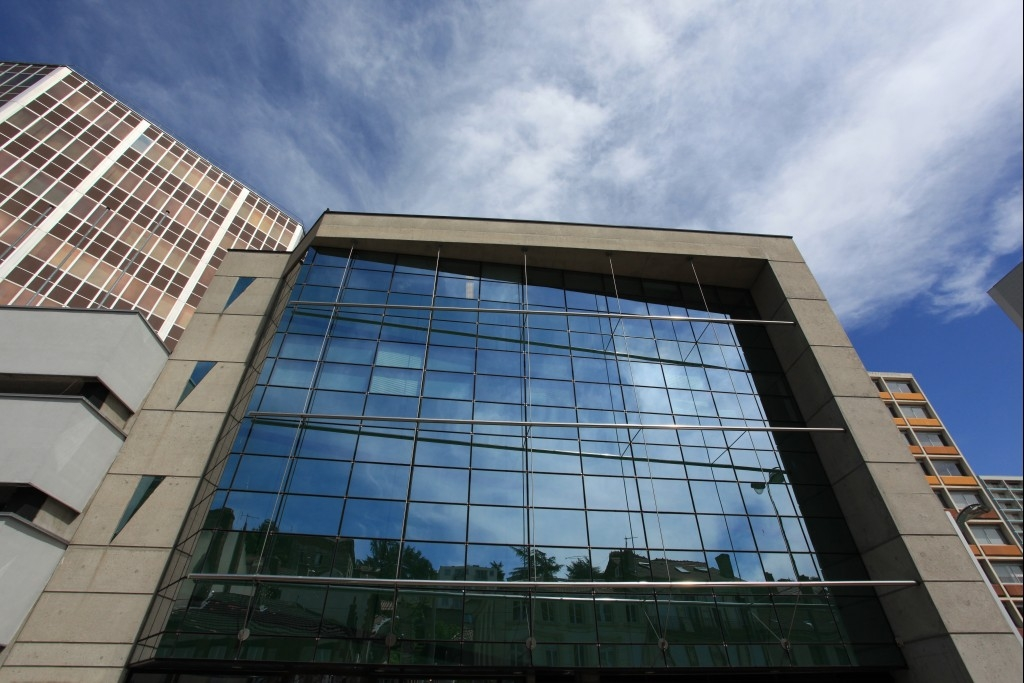 Le siège stéphanois de LOCAM